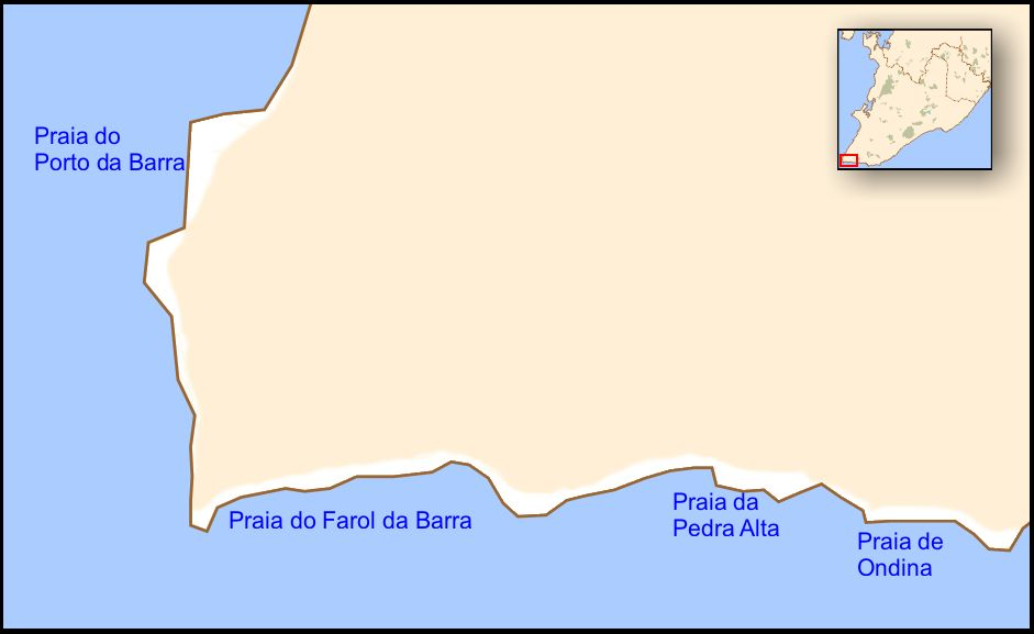 Mapa de Salvador (Bahia, Brazil) - Praias: Porto da Barra, Farol da Barra, Pedra Alta e Ondina.